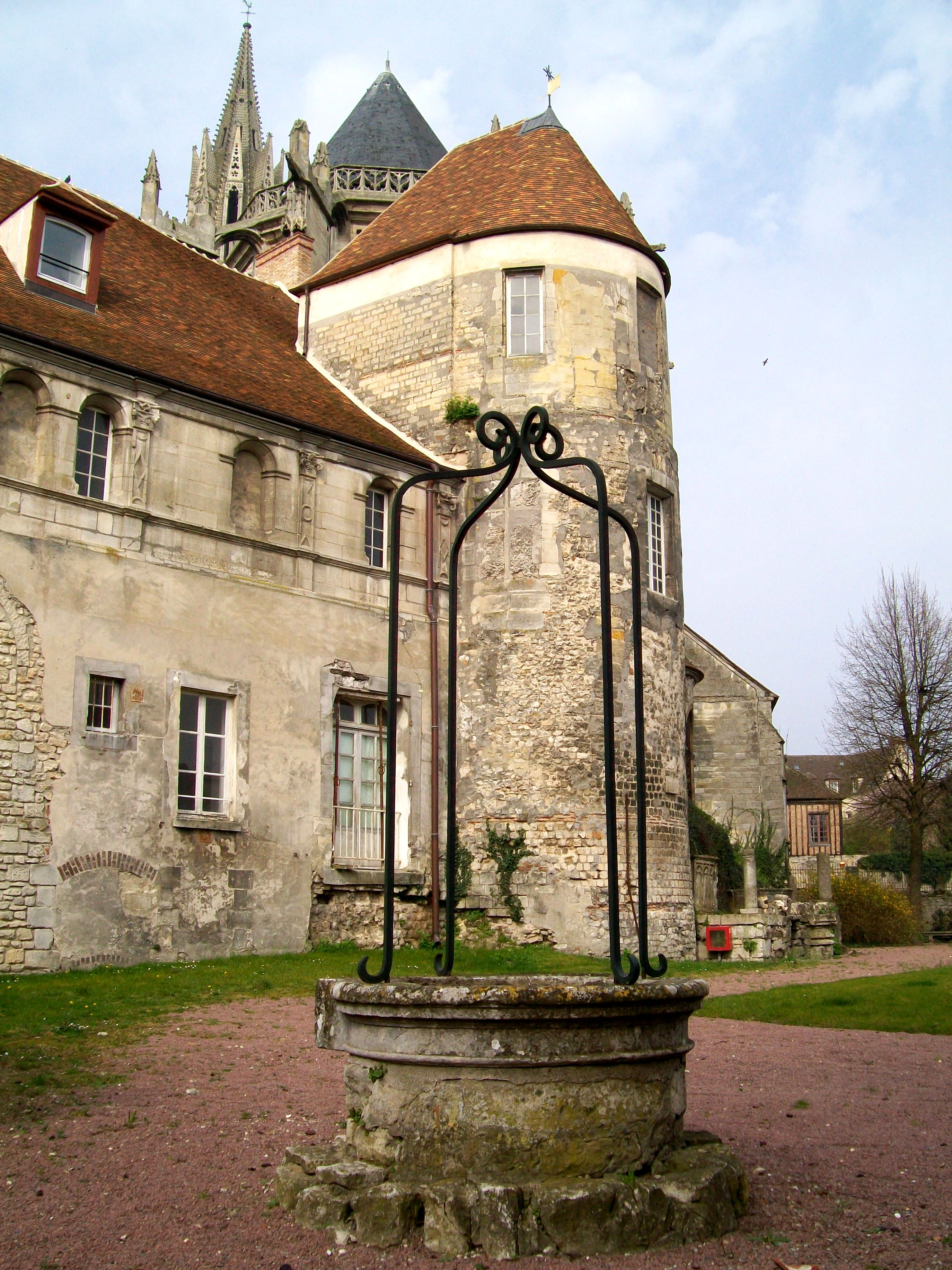 La partie la plus ancienne de l'ancien évêché, du XIIe siècle, intègre l'enceinte gallo-romaine avec l'une des vingt-six tours. Au fond, la cathédrale. Le puits a probablement été remonté ici.